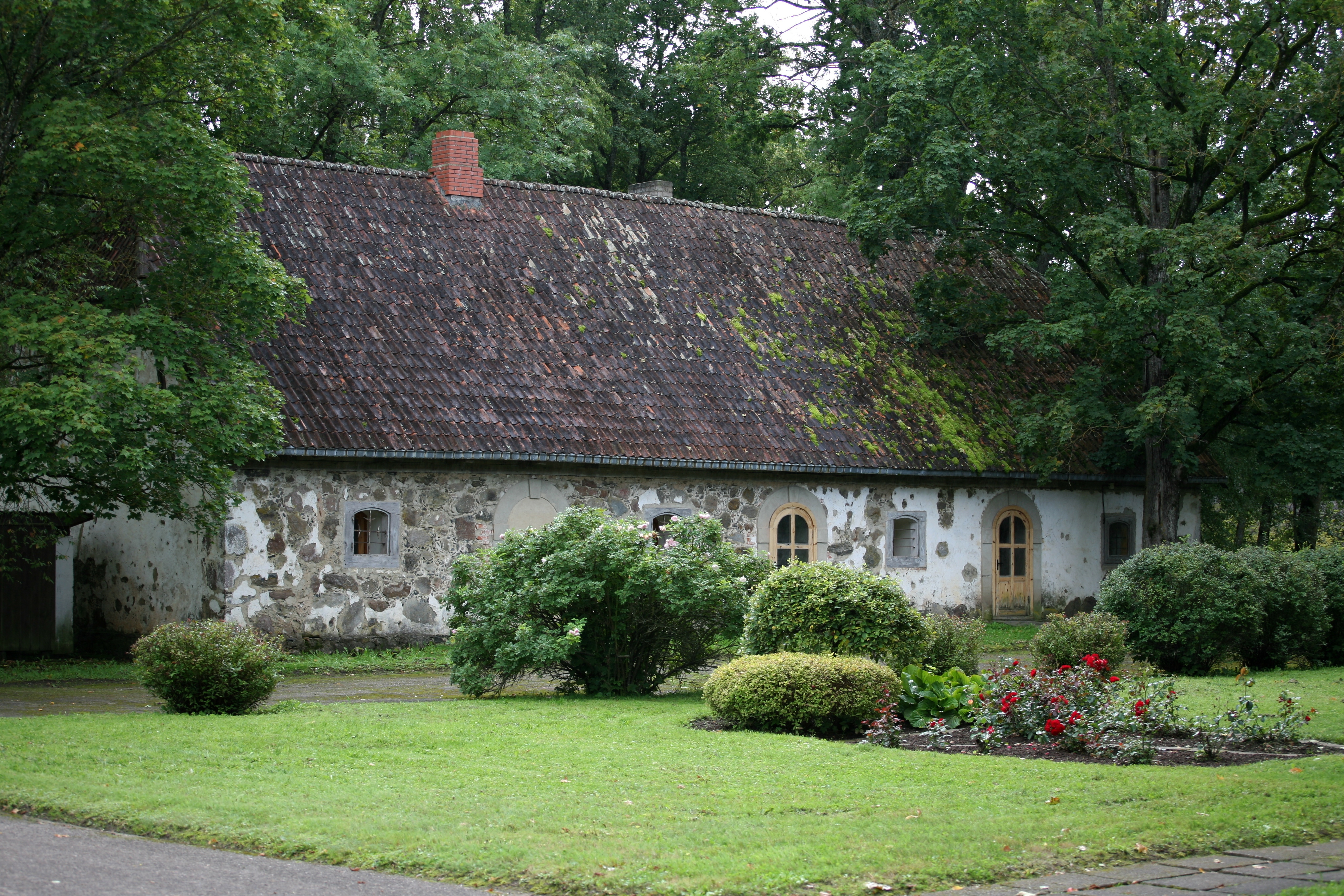 Nīgrandes pagasta sabiedriskais muzejs